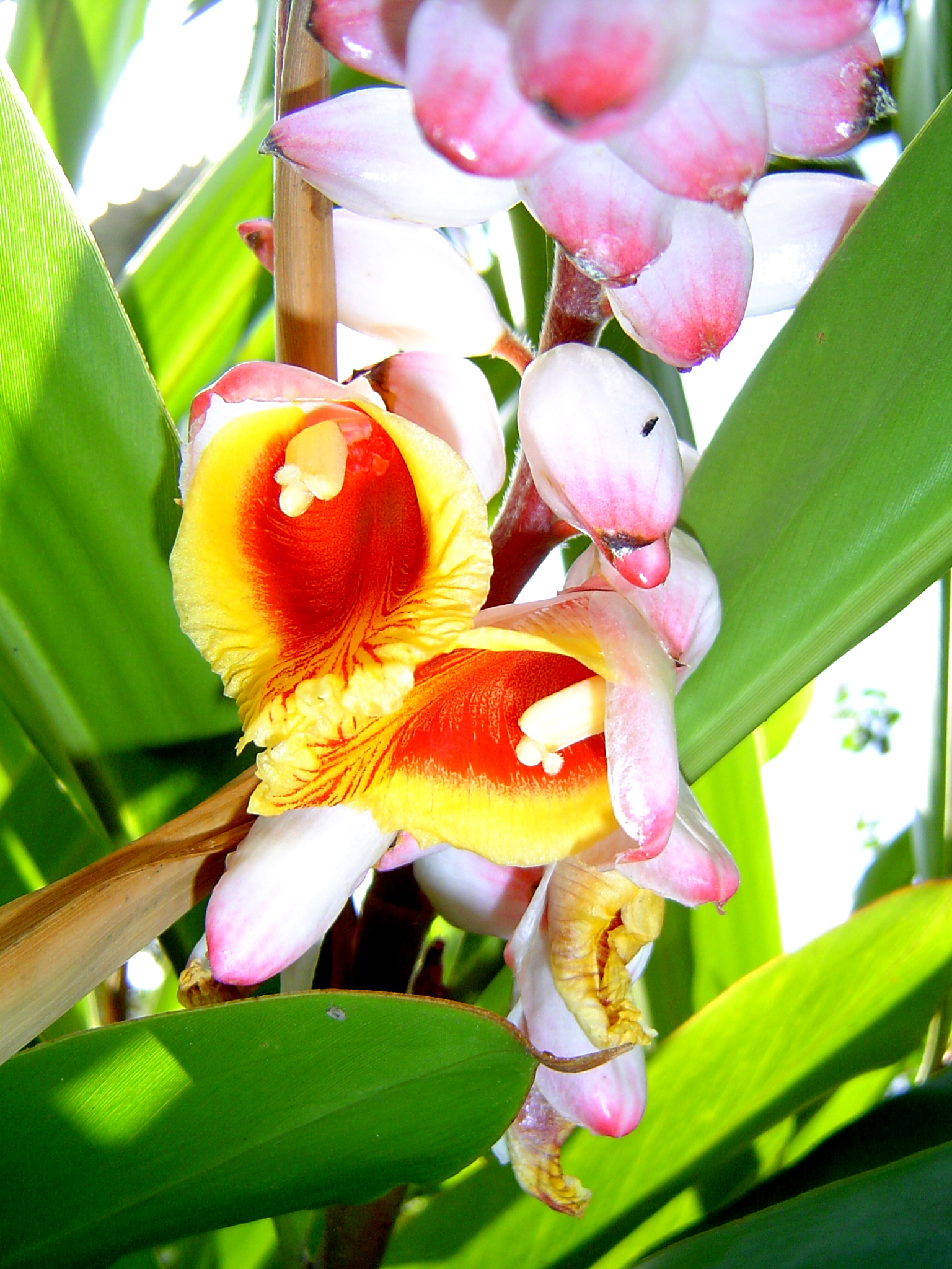 geöffnete Blüten der Alpinia zerumbet (gengibre concha)